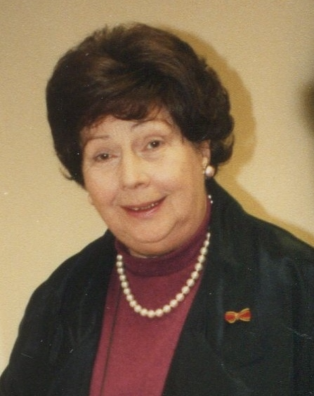 Porträt Helga Diercks-Norden, Hamburger Bürgerschaftsabgeordnete, Rundfunkratsmitglied NDR, Frau von Kameramann Karsten Diercks